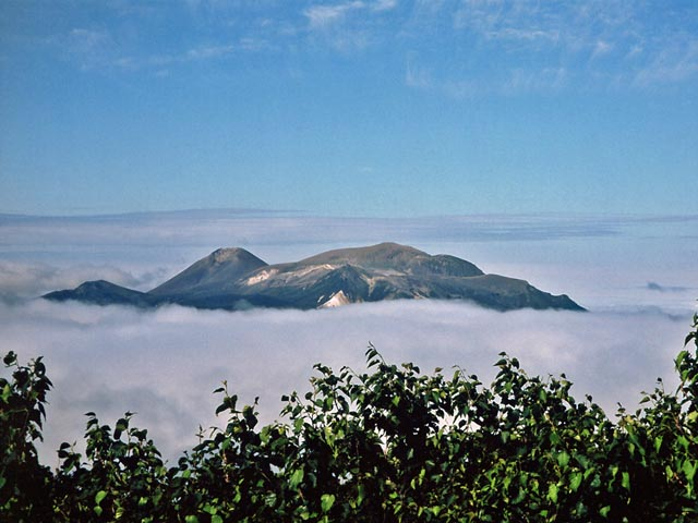 雄阿寒岳より望む雌阿寒岳。